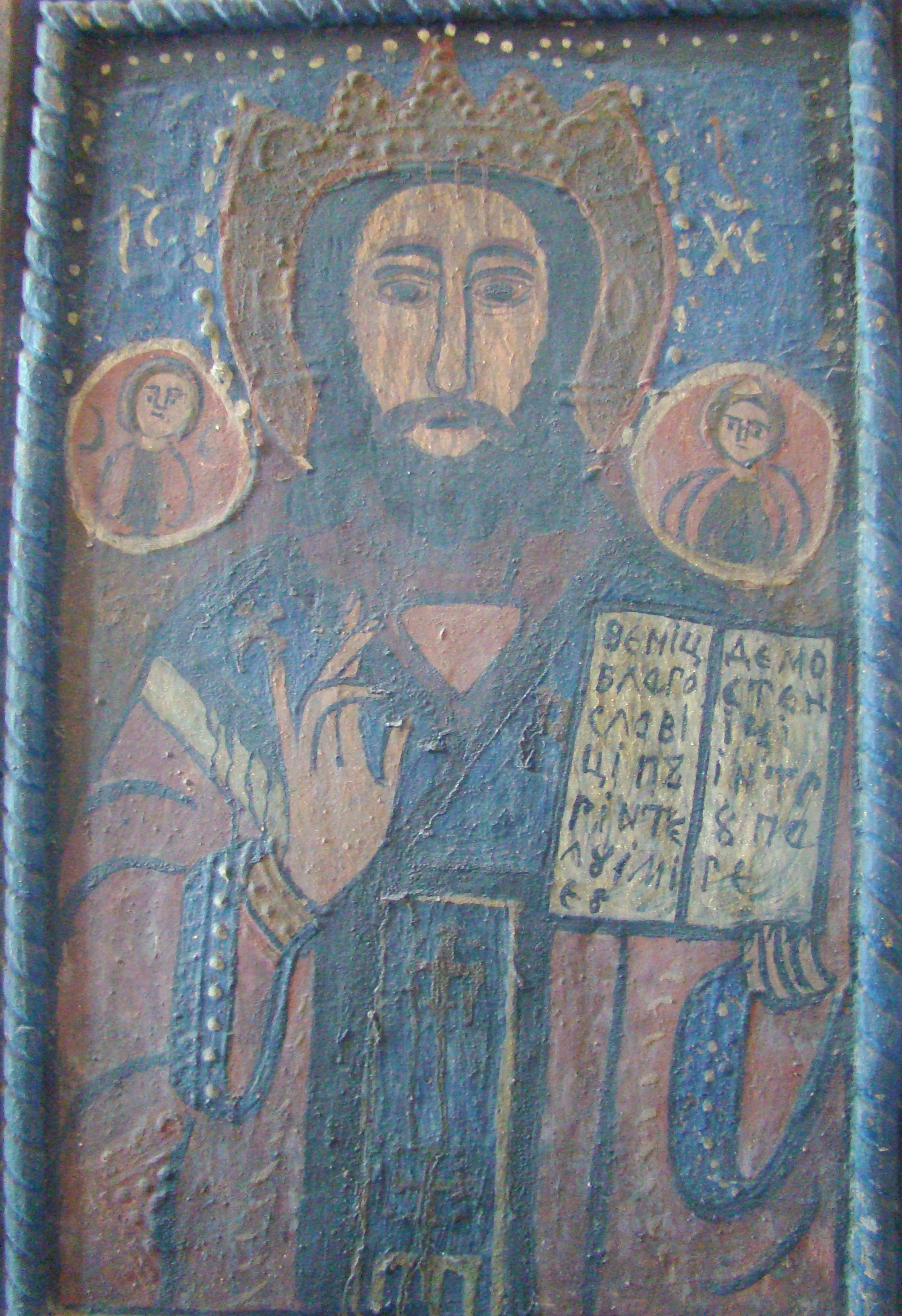 Bunuri de patrimoniu Bihor